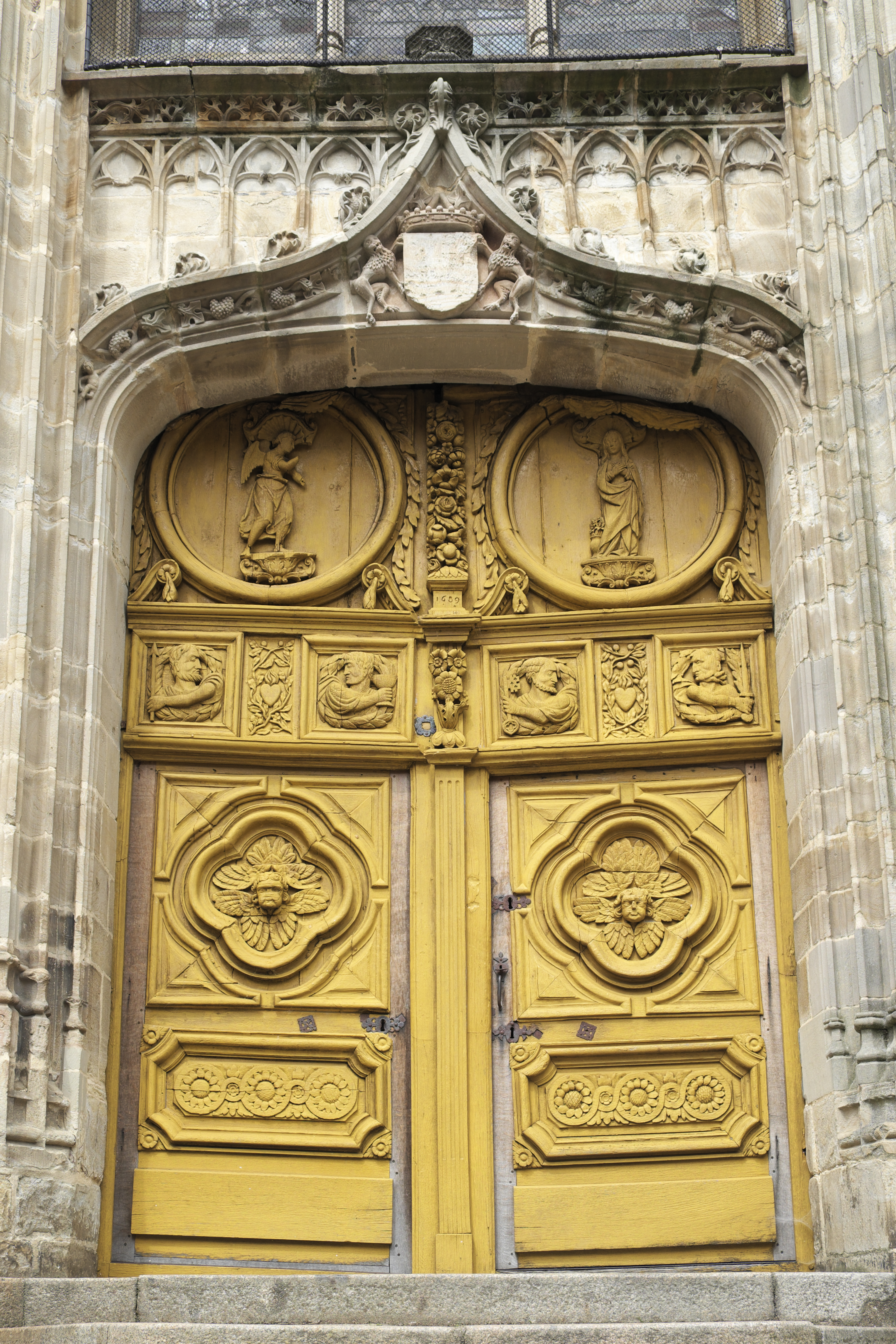 Katholische Pfarrkirche Notre-Dame in Vitré im Département Ille-et-Vilaine (Region Bretagne/Frankreich), Südportal